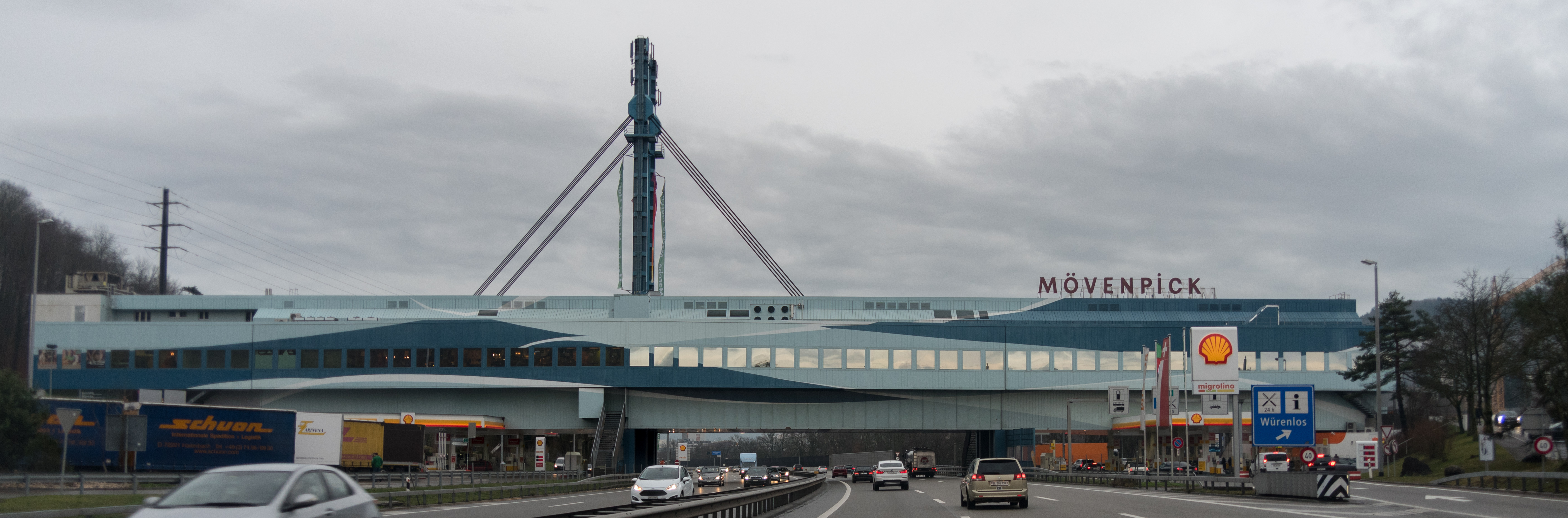 Autobahnraststätte Würenlos